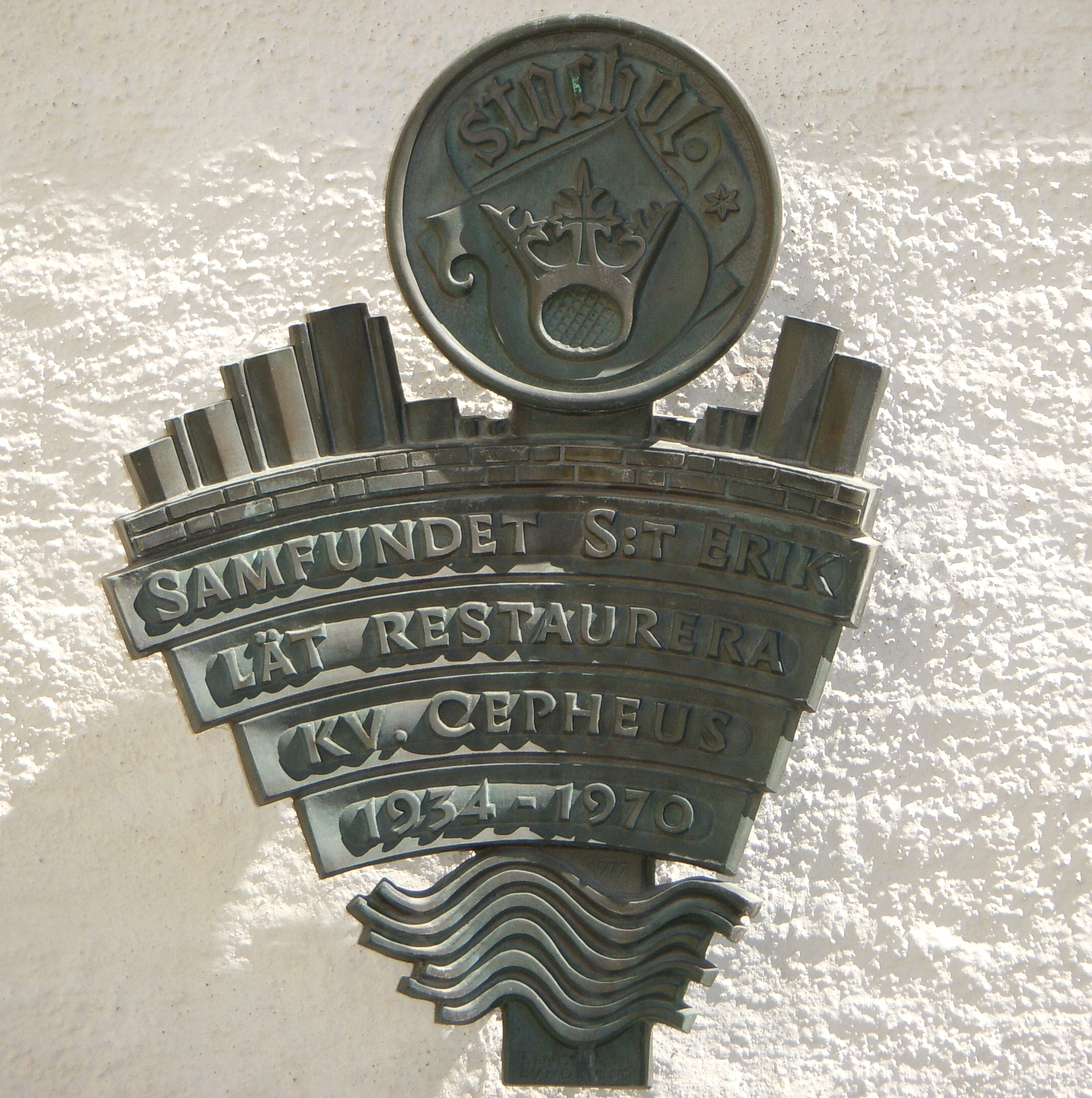 Kvarteret Cepheus i Gamla stan, Stockholm, plakett, Samfundet Sankt Erik